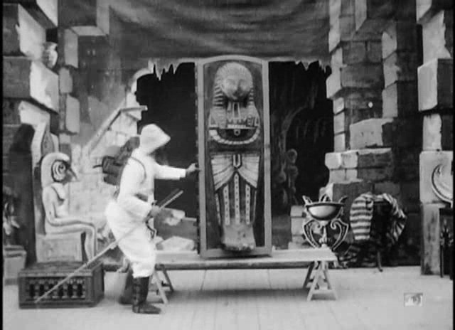 Méliès, Infortunes d'un explorateur (frammento, Star Film 234, 1900)